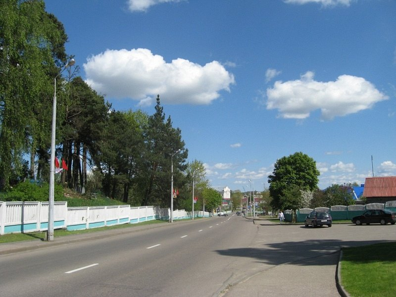 Астравец. Краявід